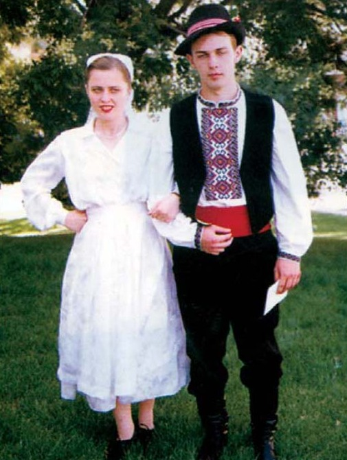 Narodna nosnja iz Petrovaca